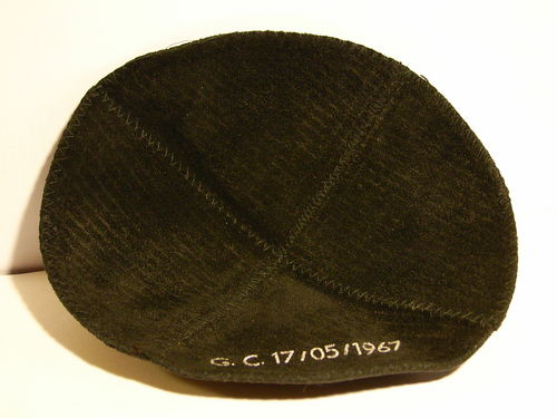 Kippah